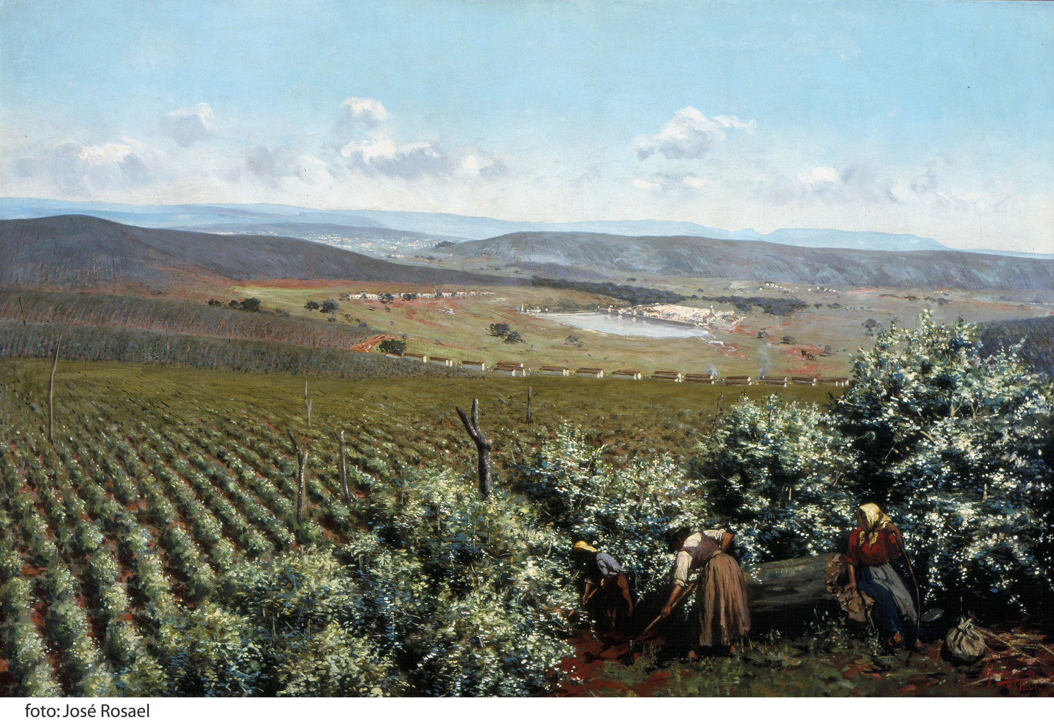 Obra que integra o acervo do Museu Paulista da USP. Fundo Museu Paulista - FMP